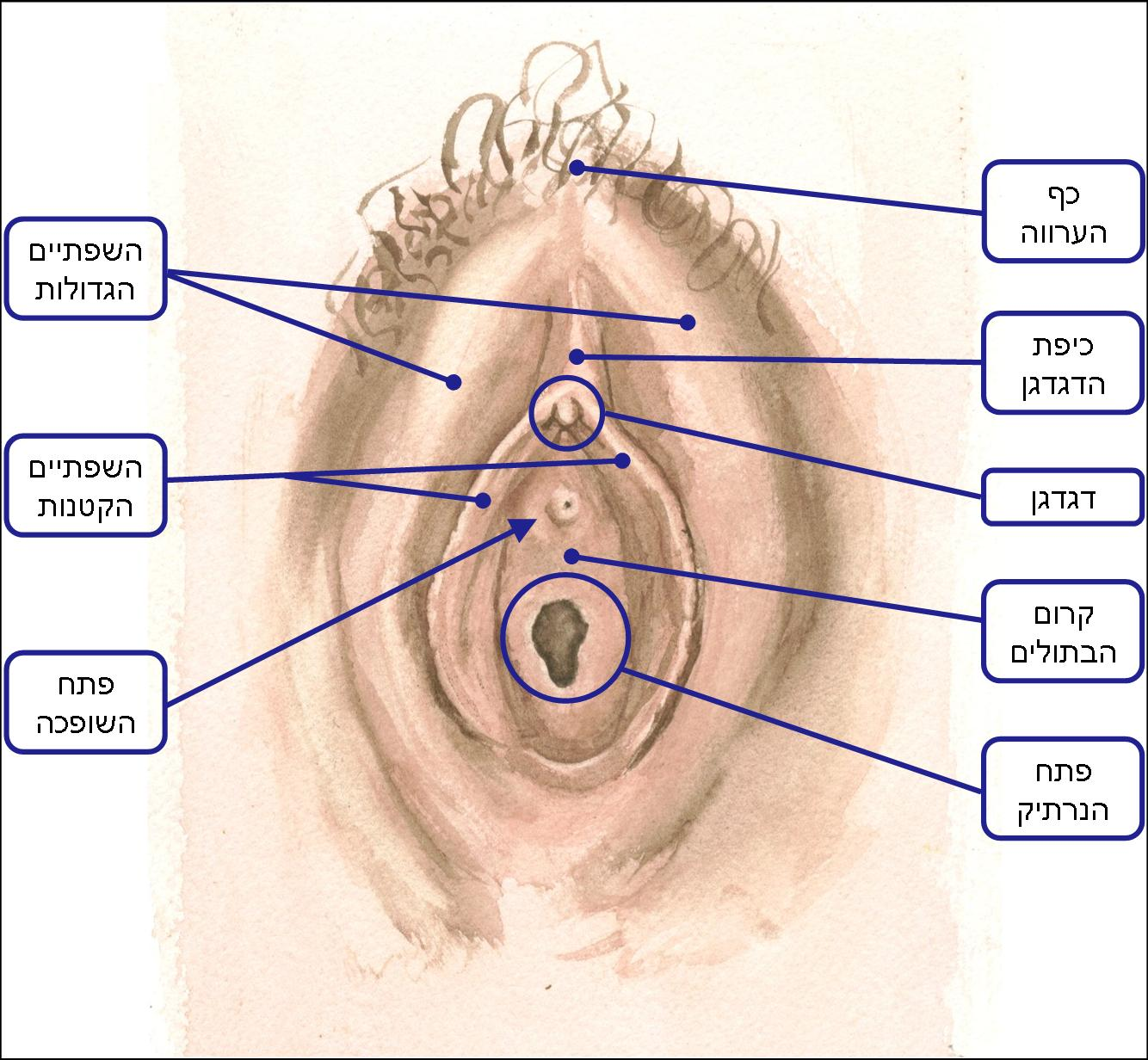 הוספתי הסברים בעברית לתמונה החופשית :תמונה:Clitoris.jpg בנמצאת בוויקישיתוף.